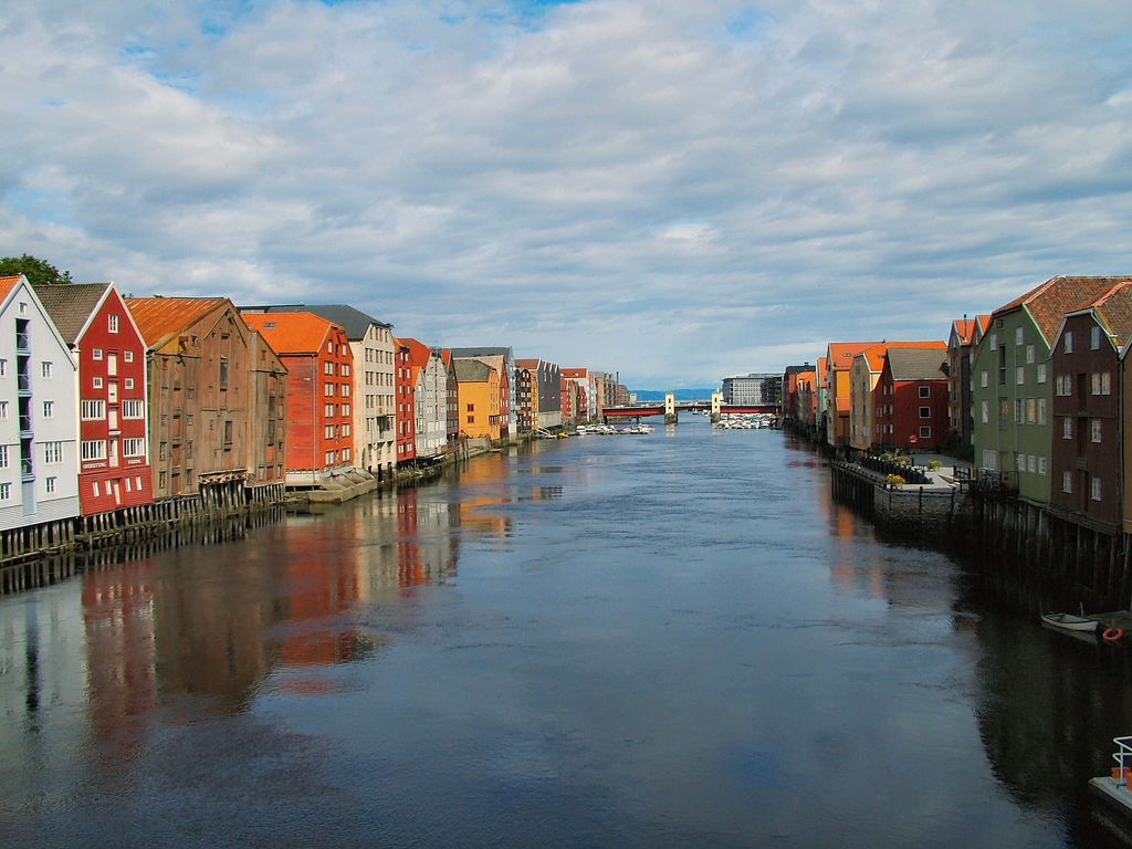 Nidelva sett fra Gamle bybro mot Bakke bru. Til venstre: Bryggerekka langs Kjøpmannsgata. Til høyre: Bryggerekka på Bakklandet.